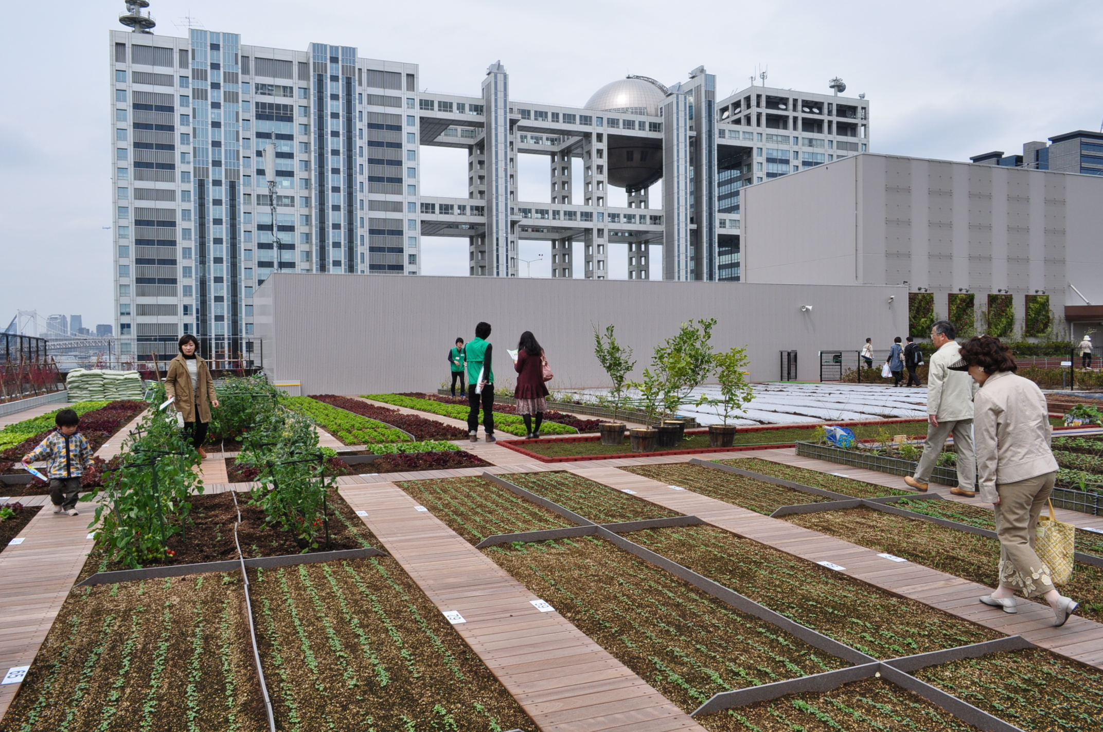 ダイバーシティ東京プラザの屋上菜園